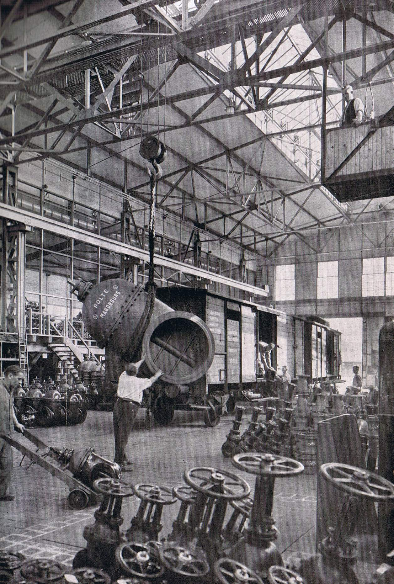 Polte-Werke, Magdeburg, Versandhalle